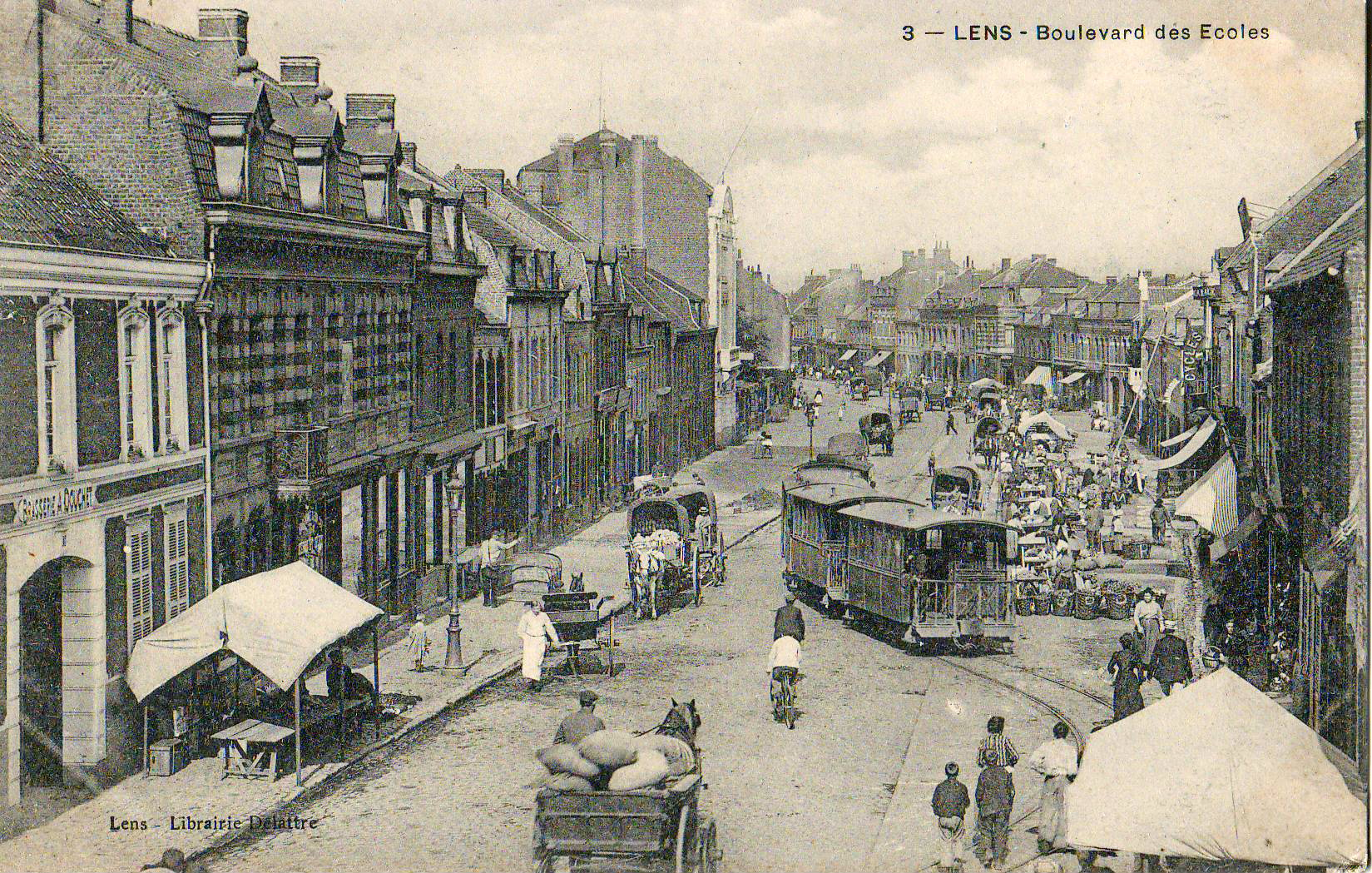 Carte postale ancienne éditée par la Librairie Delattre à Lens, n°3 :LENS - Boulevard des écoles